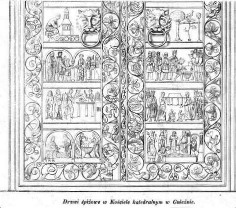 "Drzwi spiżowe w Kościele katedralnym w Gnieźnie". Fragment litografi opublikowanej w 1843 r. w piśmie "Przyjaciel Ludu"